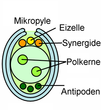 Schema des Embryosacks von Angiospermen: Eizelle gelb, Synergiden orange, Kernzellen hellgrün, Antipoden dunkelgrün